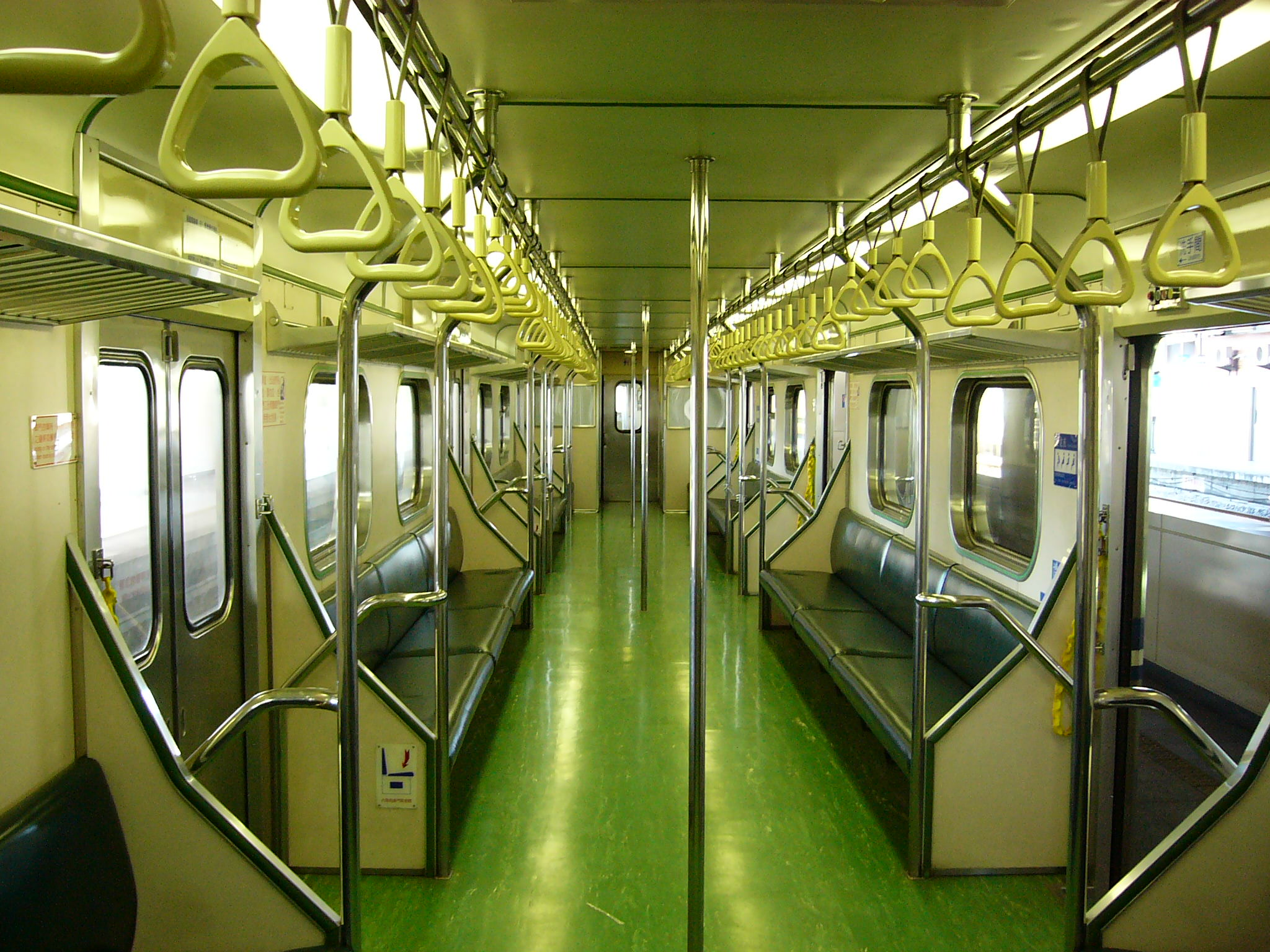 中文（台灣）: 臺灣鐵路管理局七堵車站EMU500型電聯車內裝。